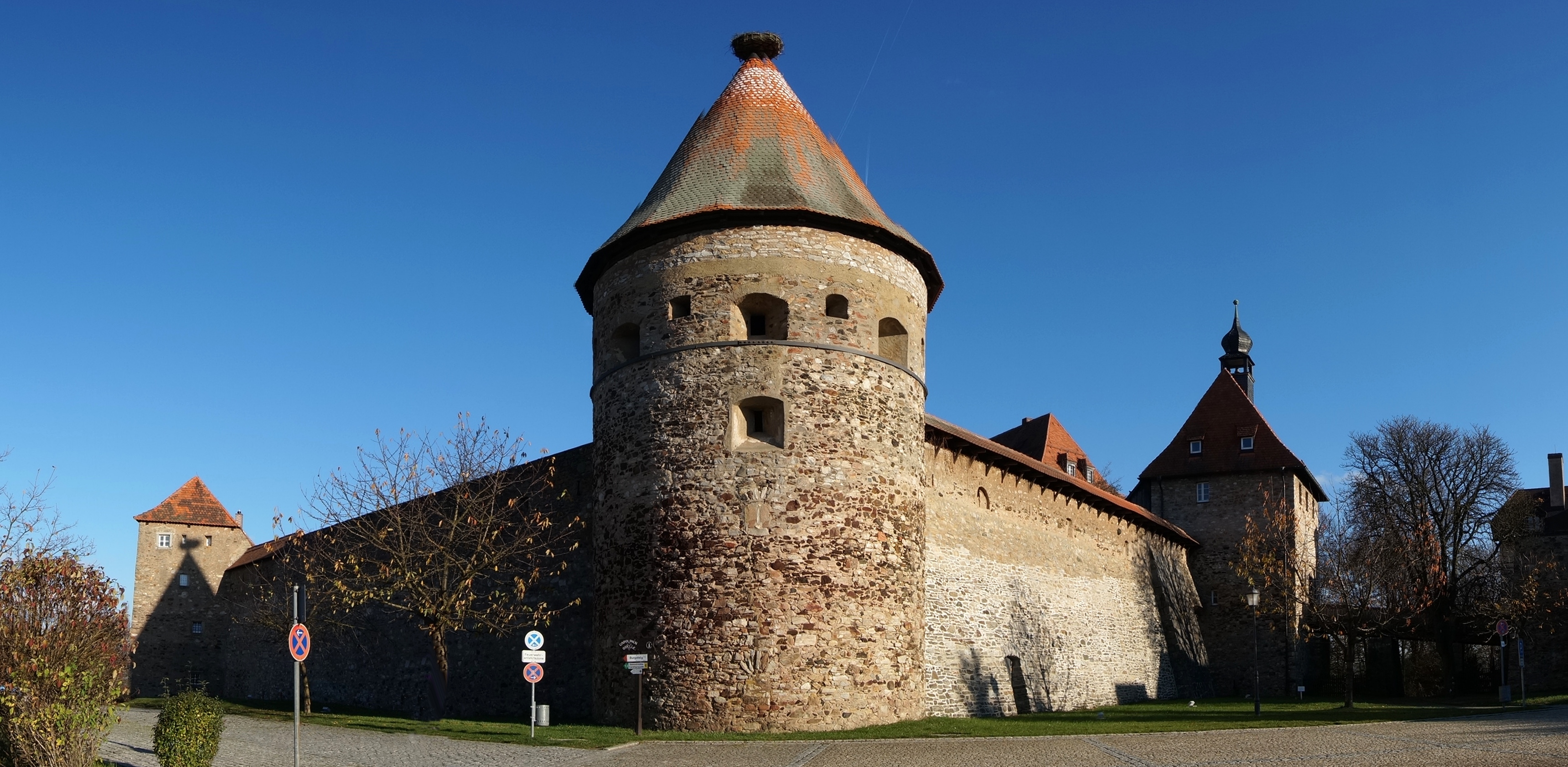 Deutschland, Bayern, Landkreis Wunsiedel, Ort Hohenberg an der Eger, Burg Hohenberg vom PKW-Parkplatz